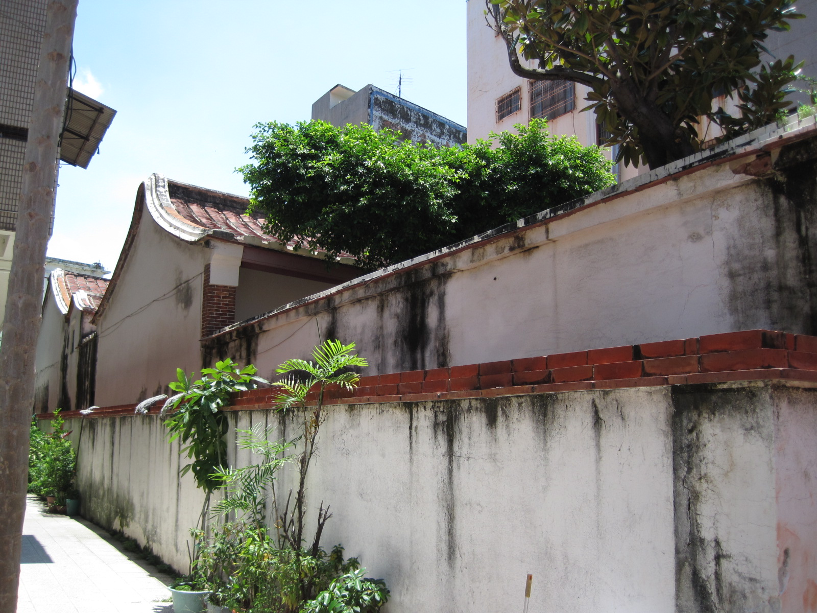 臺南報恩堂側面